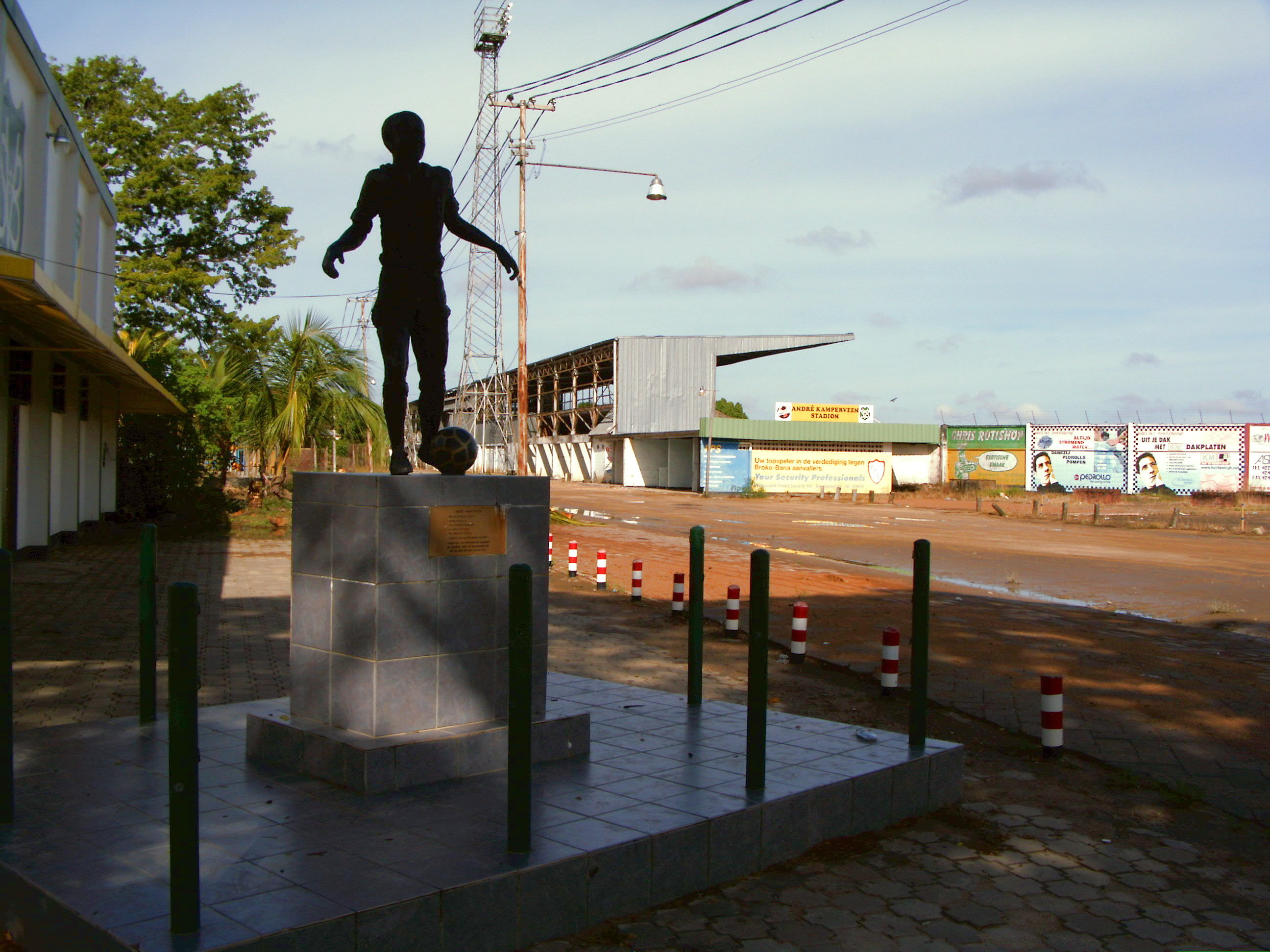 Standbild von Andre Kamperveen vor dem gleichnamigen Stadion in Paramaribo, Suriname